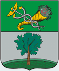 Герб Богодухівського району Харківська область України